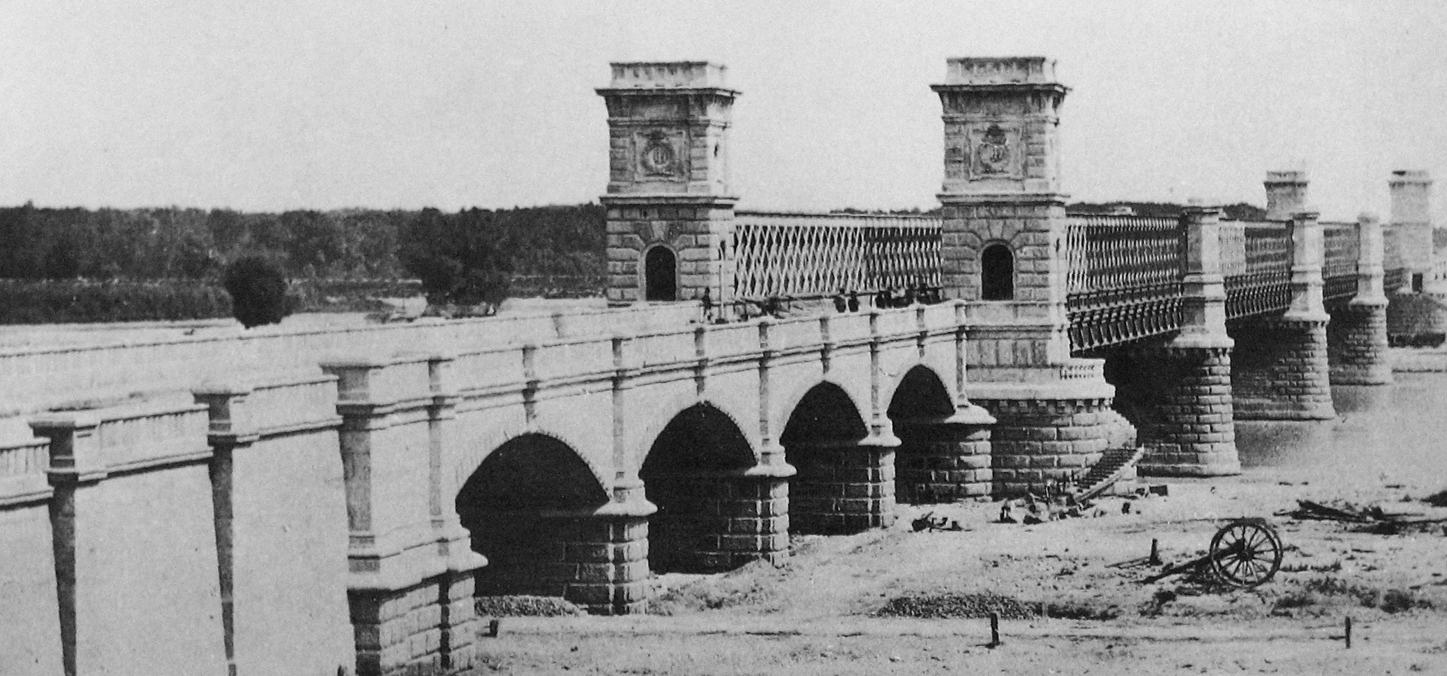 Wien, Kronprinz-Rudolf-Brücke, 1876